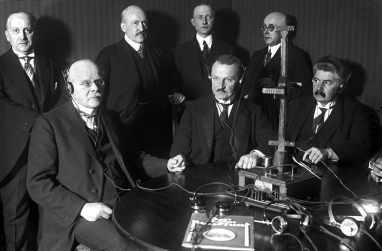 Der Reichskanzler des deutschen Reiches spricht erstmalig per Radio seine Weihnachtsproklamation. Der Reichskanzler beim Hören von Radio-Gesprächen. Von links nach rechts: Reichskanzler Dr. Marx, Minister Scholz und Abgeordneter Fischer.